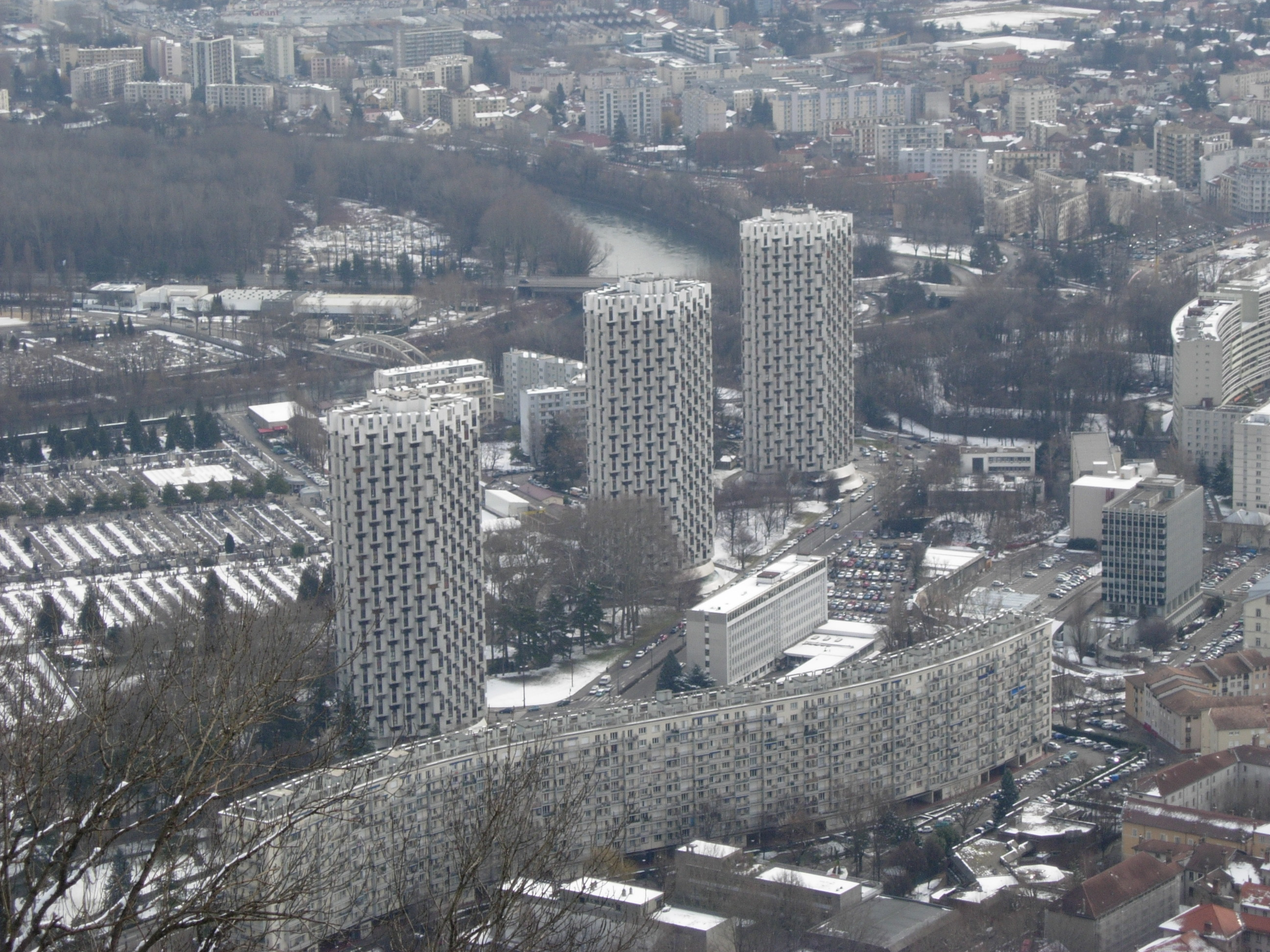 "Les Trois tours de l'Île verte": Belledonne, Vercors et Mont Blanc à Grenoble, France (ce n'est pas le village olympique des jeux de 1968).